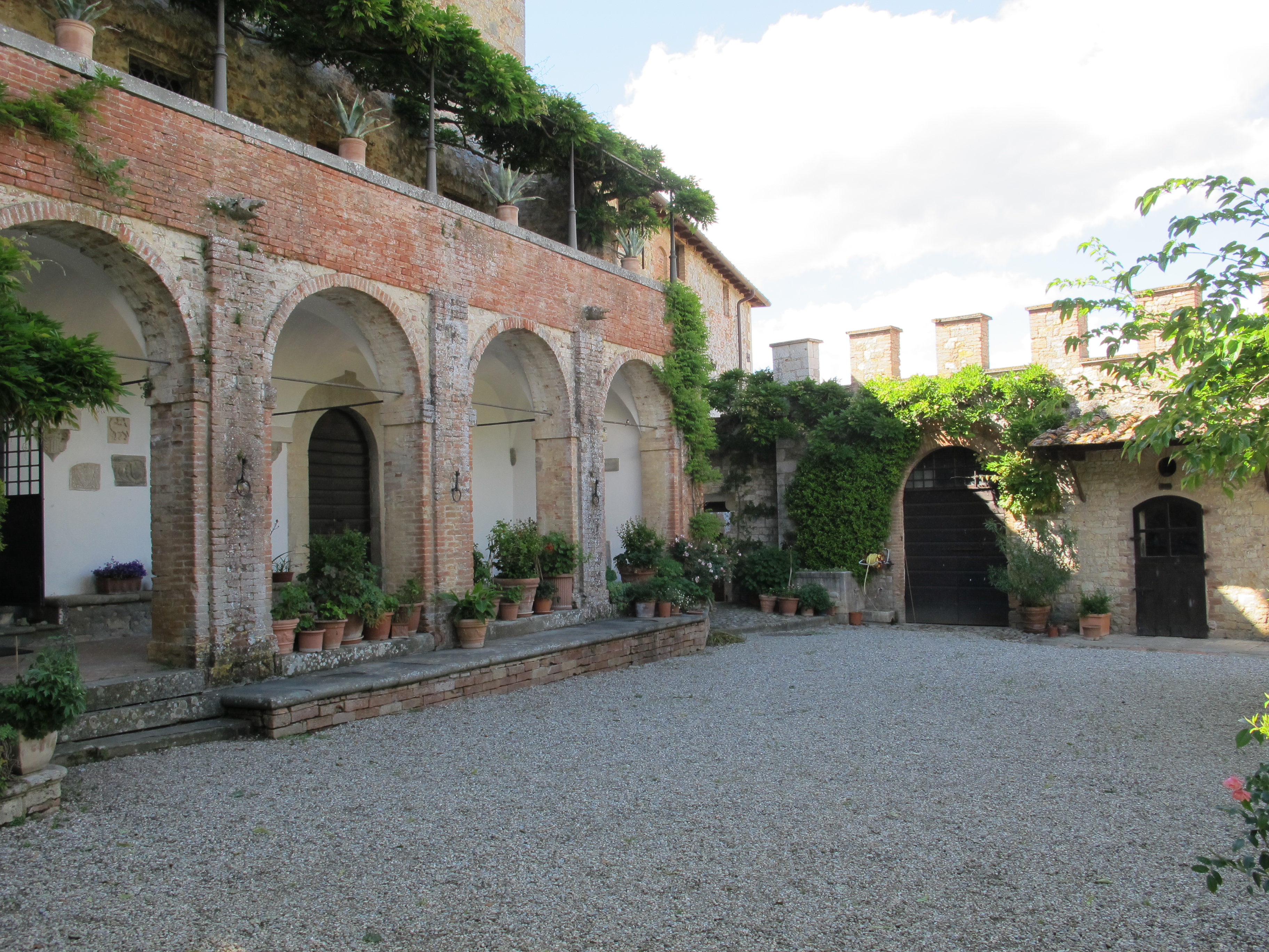 Castello di montalto, cortile con loggia